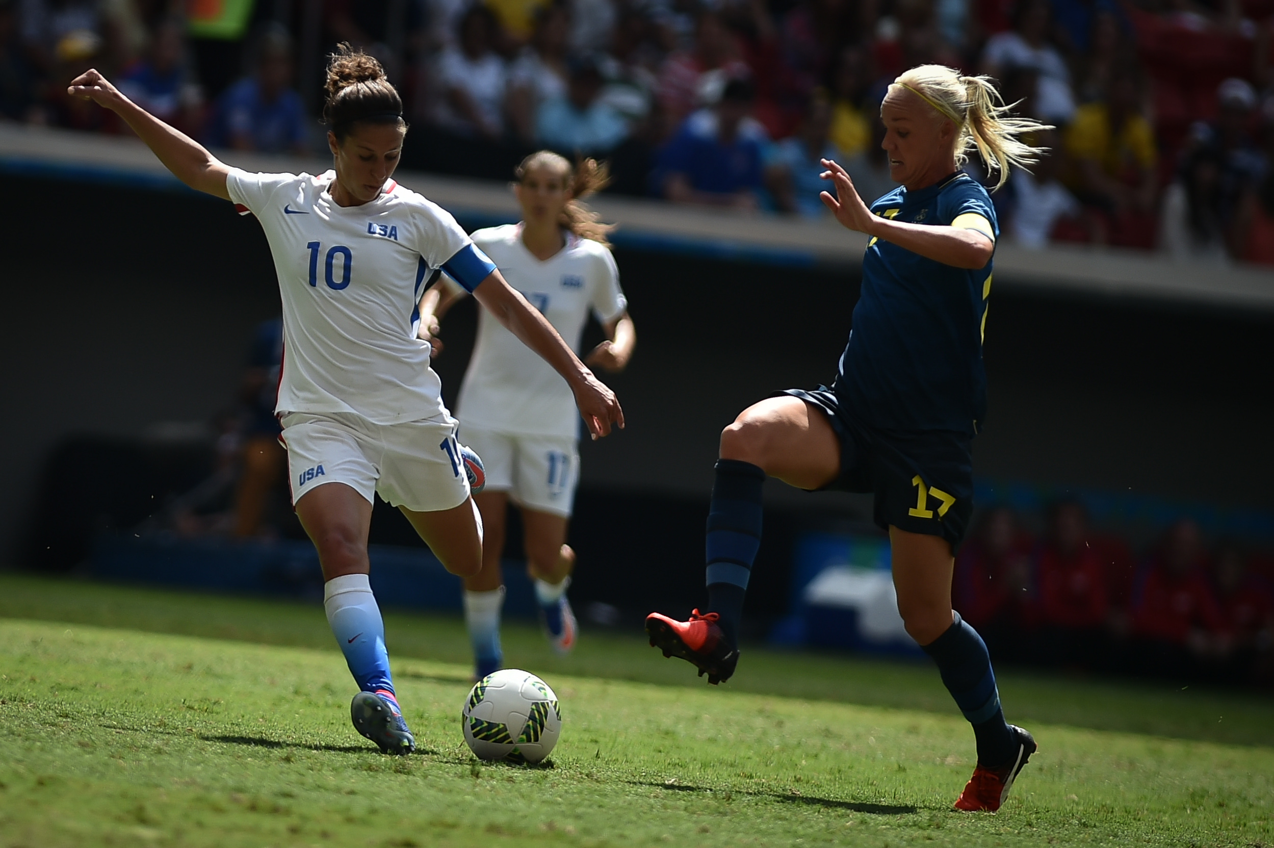 Estádio Nacional de Brasília Mané Garrincha, Brasília, DF, Brasil, 12/8/2016 Foto: Andre Borges/Agência Brasília Estados Unidos e Suécia jogam nesta sexta-feira (12), no Estádio Mané Garrincha, pelas quartas de final do futebol feminino na Olimpíada 2016.